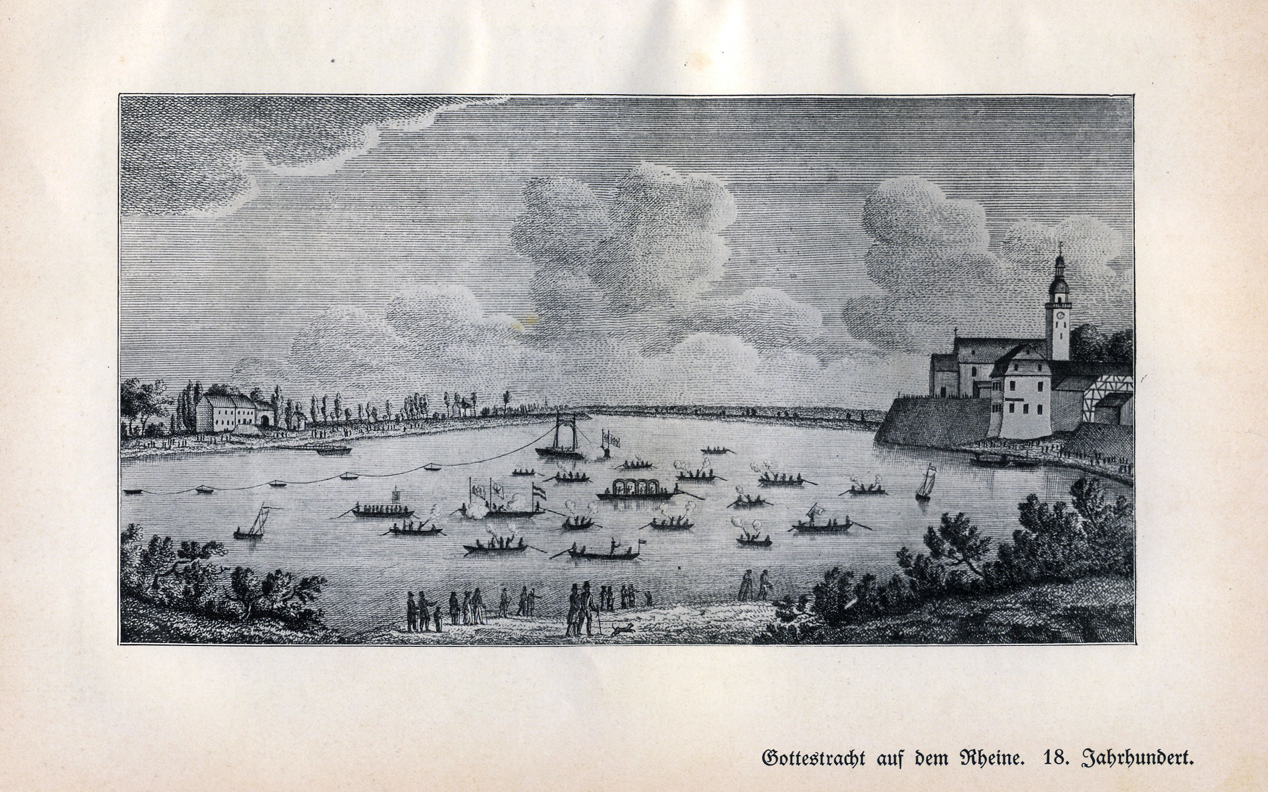 Gottestracht auf dem Rheine. Mulheim am Rhein im 18. Jahrhundert, Stahlstich W. Engels, Cöln